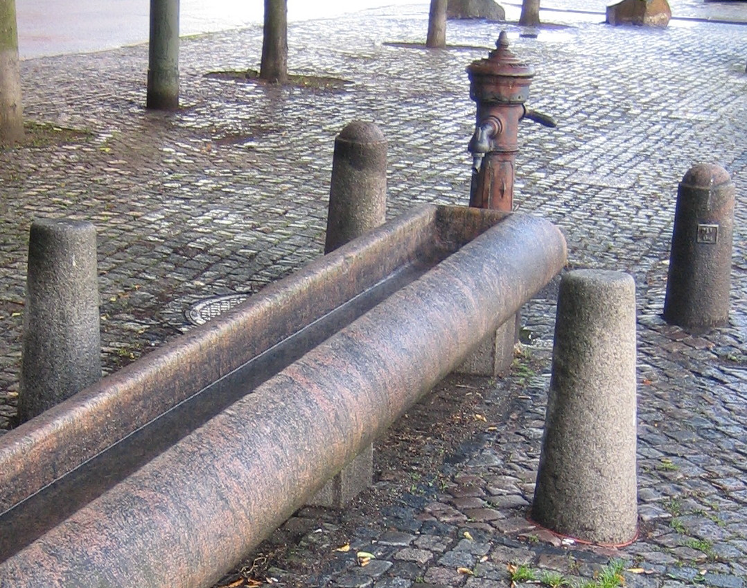 Old water pump at Drottningtorget in Malmö, Sweden.